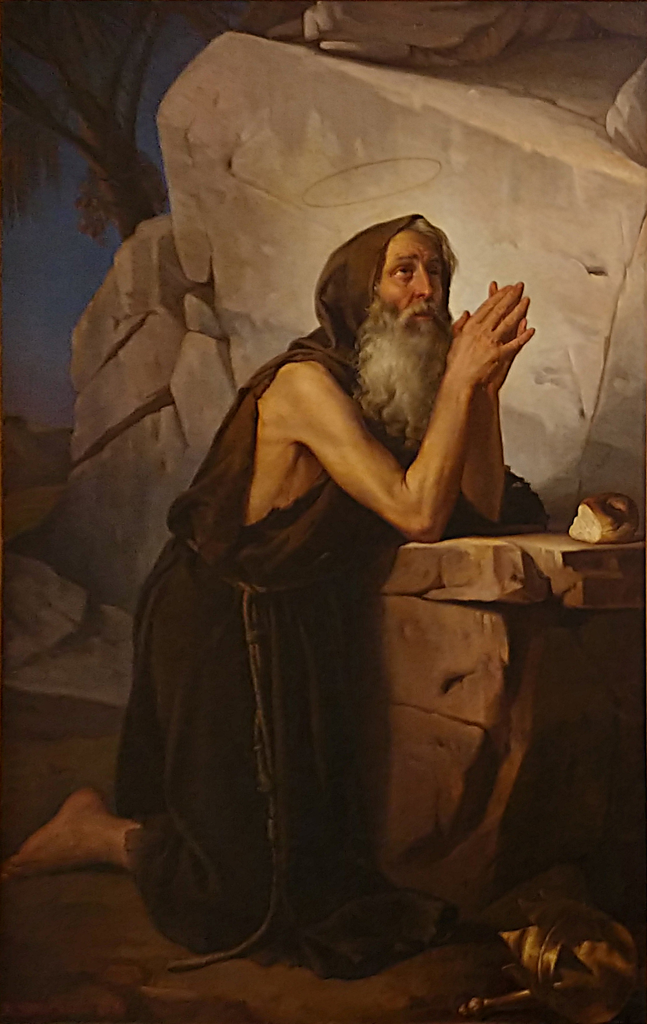 Antonio Molinari, Sant'Onofrio in preghiera (XVII-XVIII secolo).